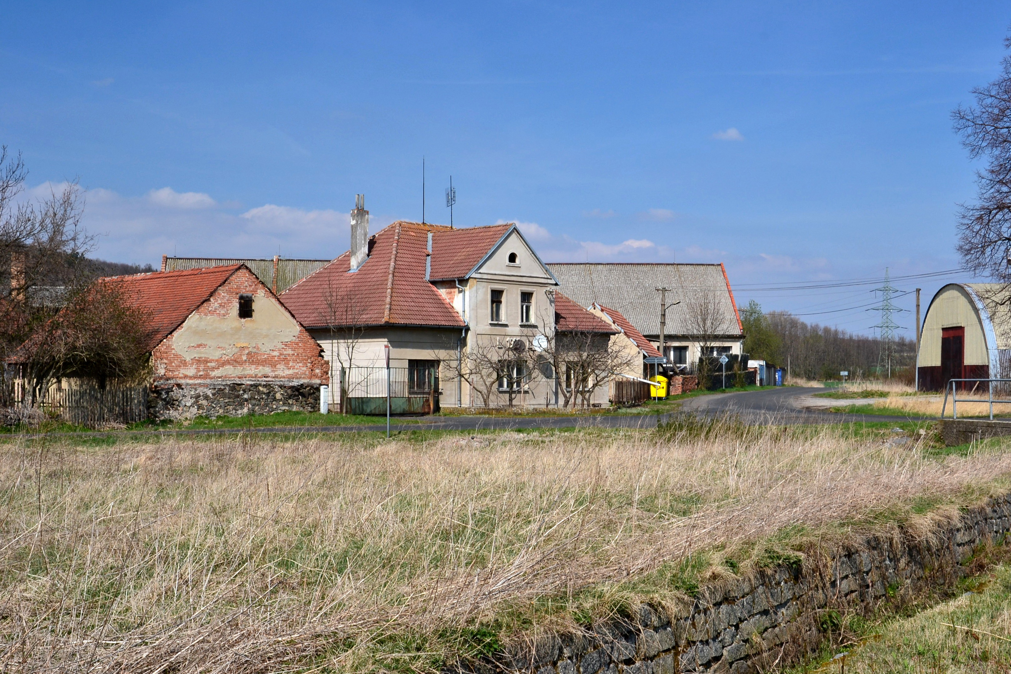 Háj u Radonic